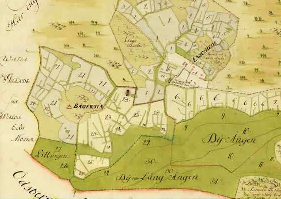 Bägerstas åkermark är markerad med grå (21-22) och gul (23-25) färg och skiljs av ett hägnadssystem, i väster går Göta landsväg